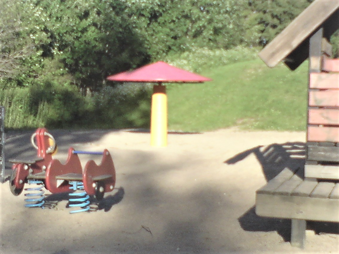 Svampen på övre Brånans lekpark.